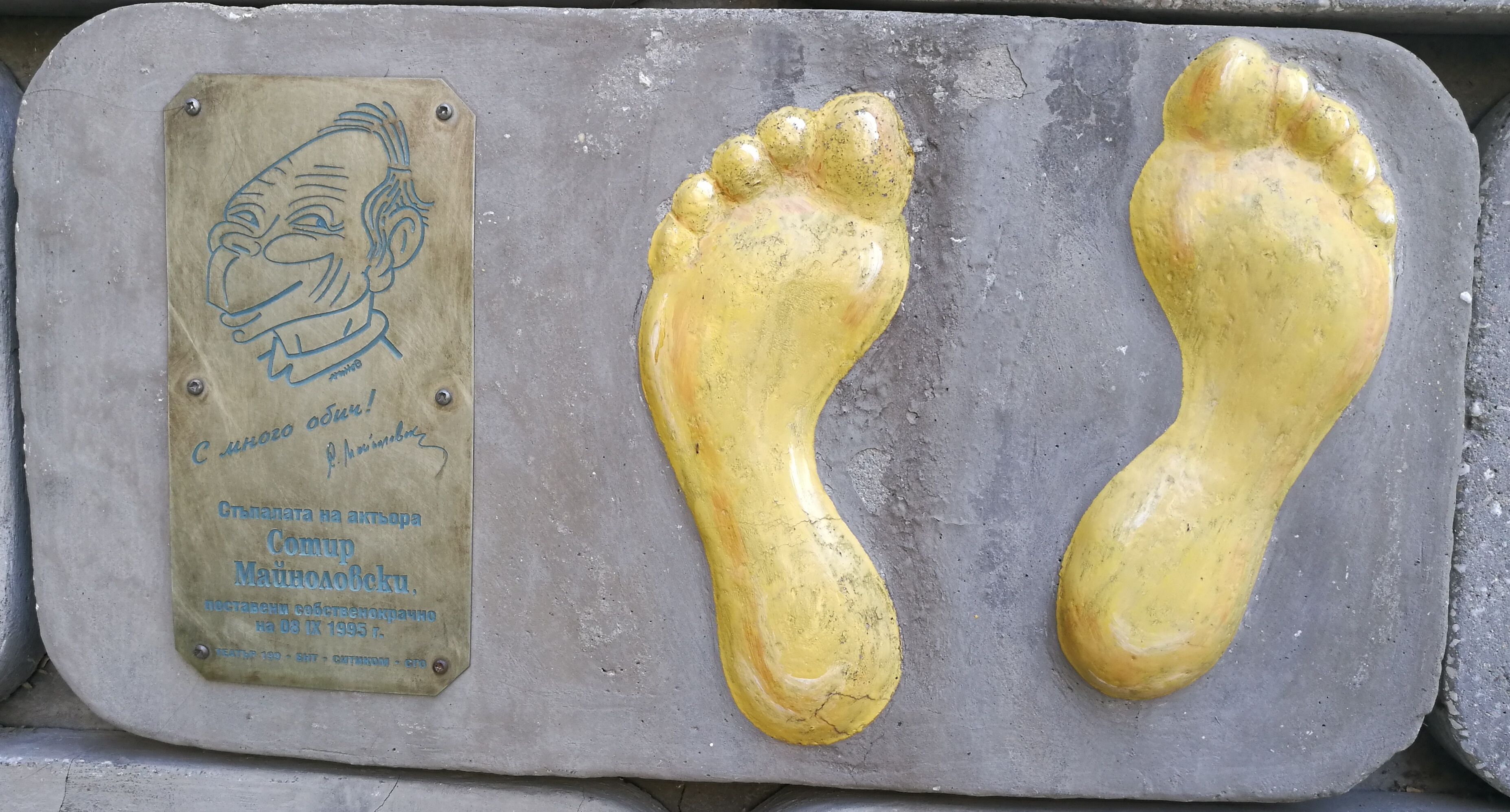 Стената на славата пред Театър 199 - пано с отпечатъци, послание и шарж на Сотир Майноловски.